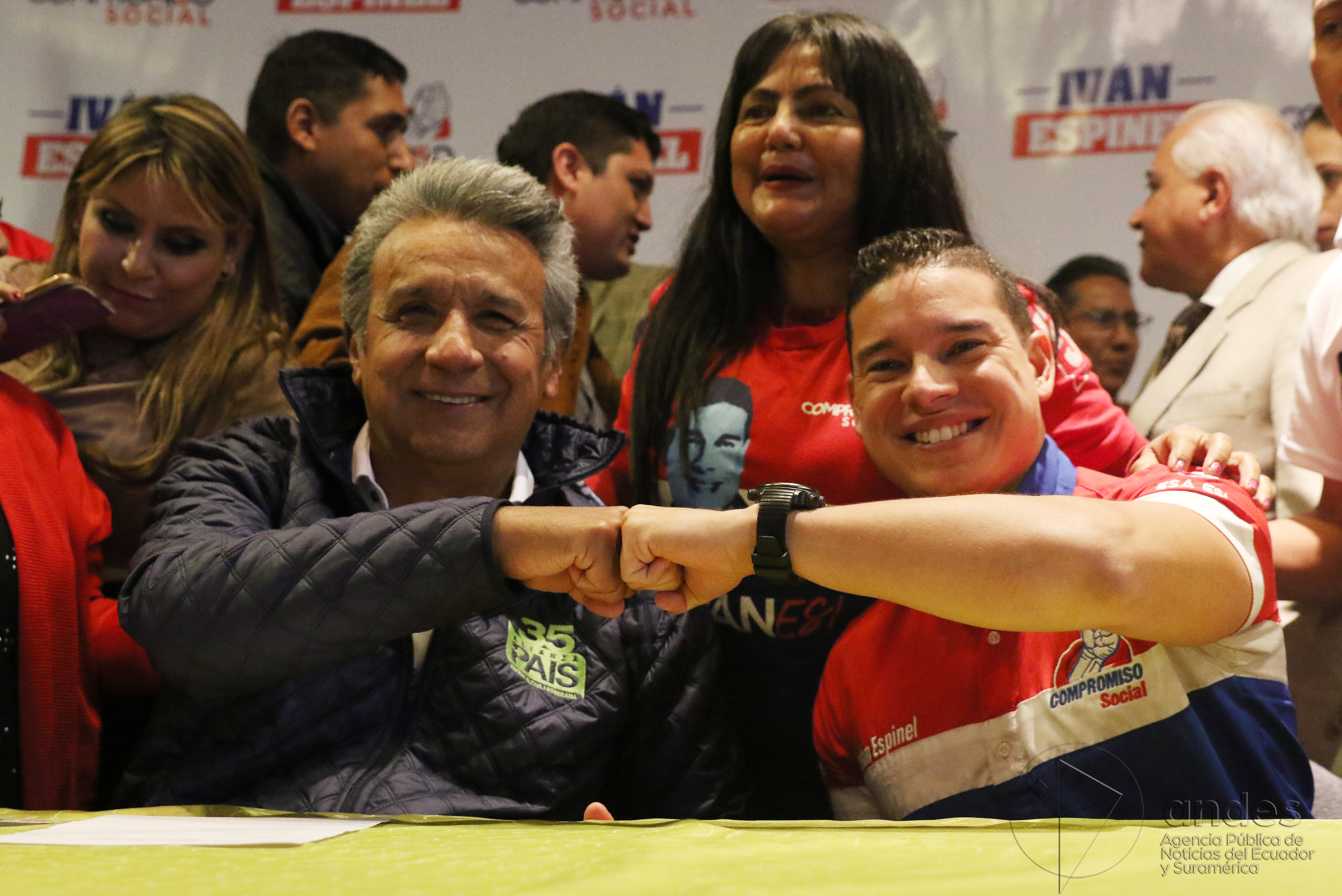 Quito, 09 de marzo de 2017 (Andes).- Iván Espinel y su partido Fuerza Compromiso Social dio a conocer su apoyo al candidato Lenin Moreno en la segunda vuelta electoral camino a la presidencia de la Repúbica el próximo 2 de abril del 2017. ANDES/Micaela Ayala V.